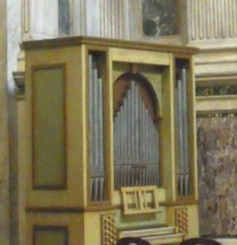 L'organo Leonardo Forti (II+P/22) della cappella Corsini, nella basilica di San Giovanni in Laterano